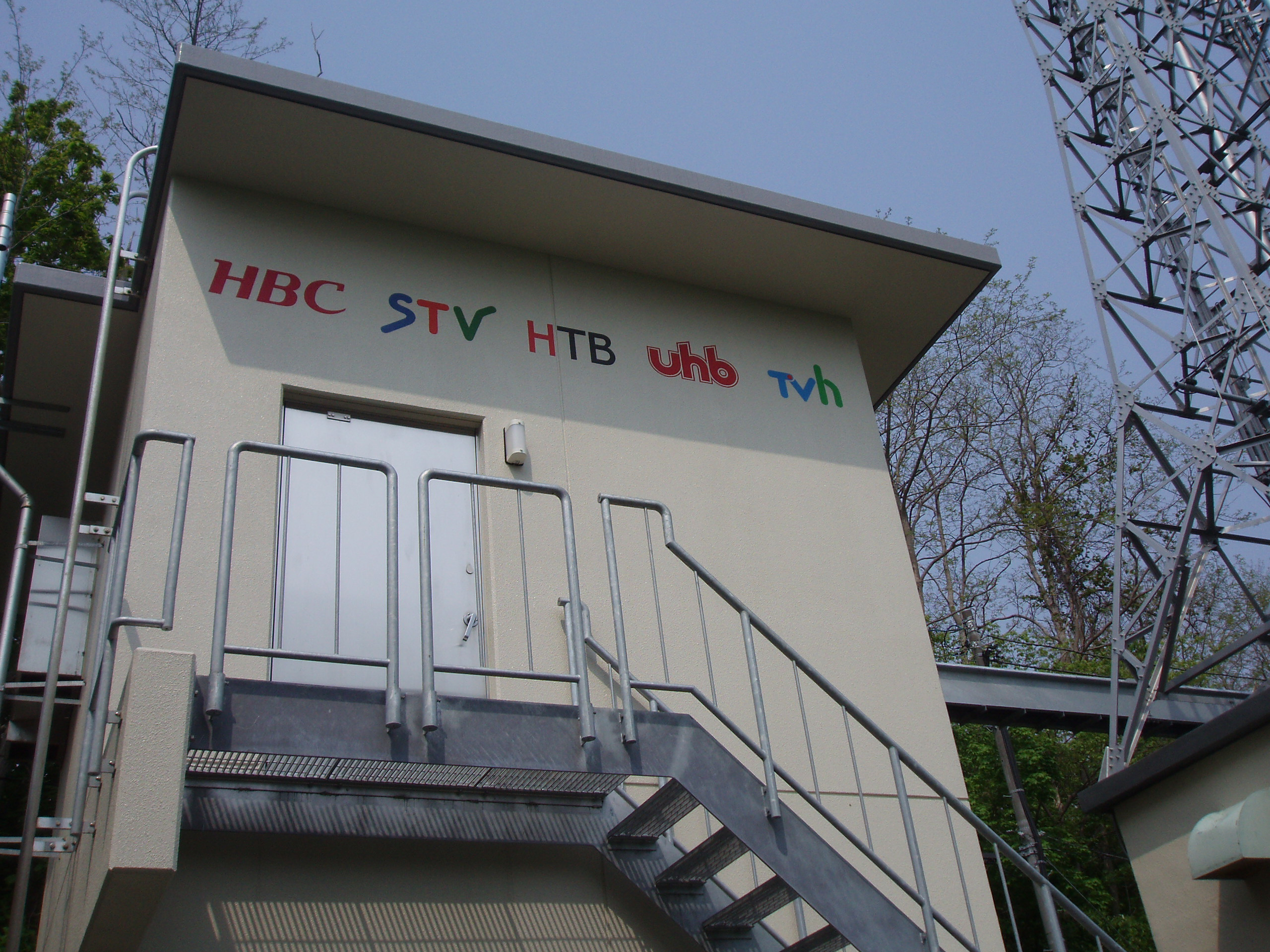 小樽中継局 HBC・STV・HTB・UHB・TVh送信局舎